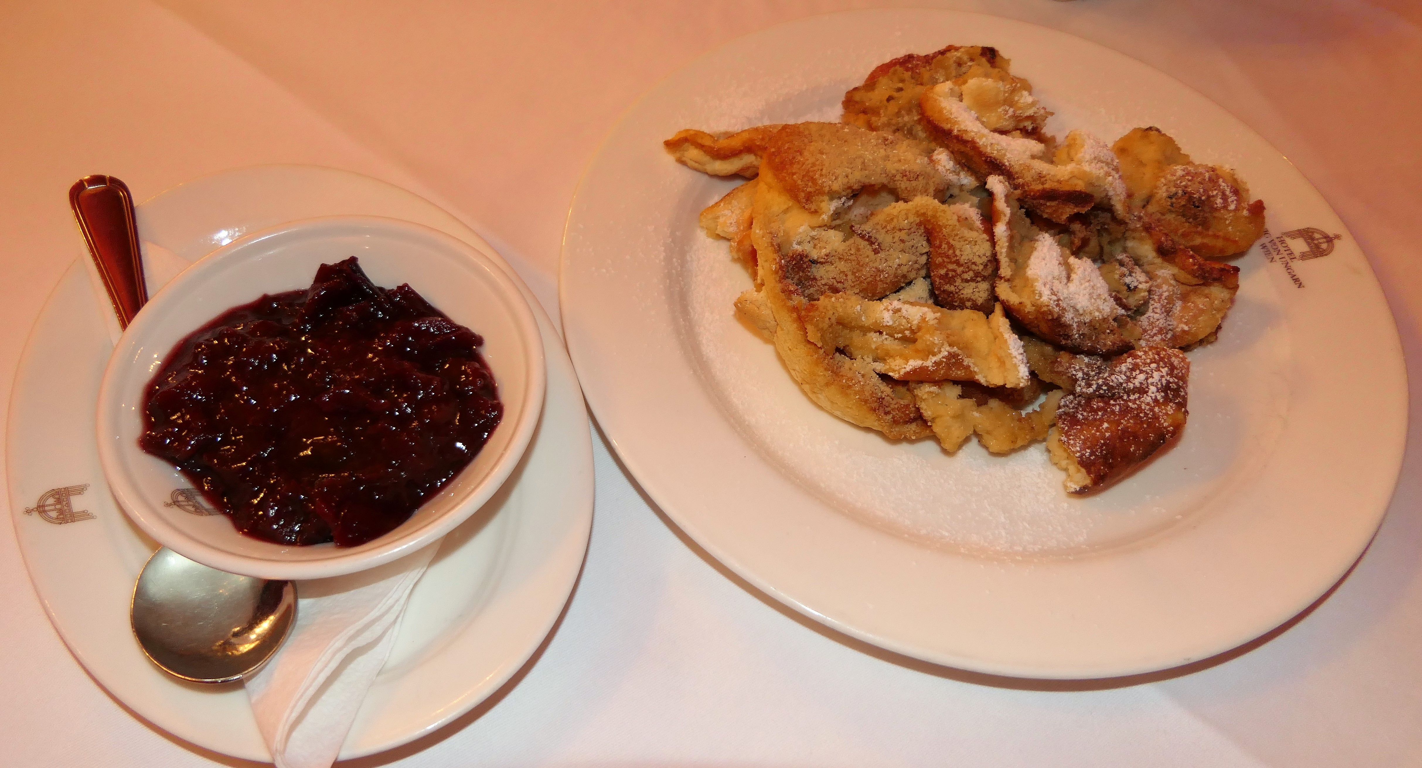 Kaiserschmarrn mit Zwetschkenröster, Restaurant Hotel König von Ungarn, Wien